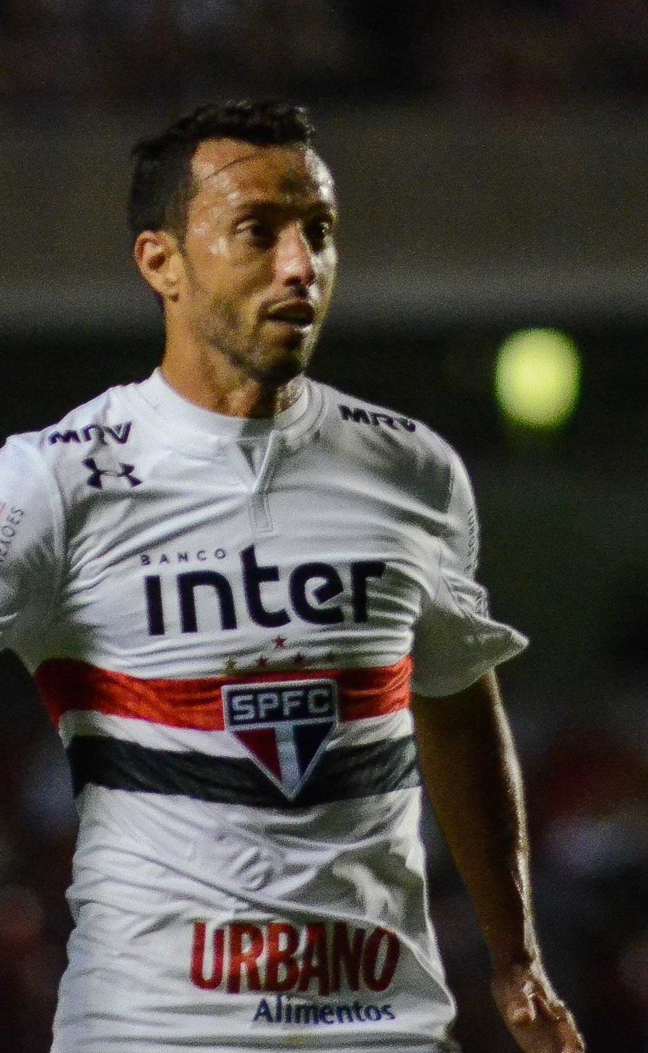 Nenê no São Paulo em 2018